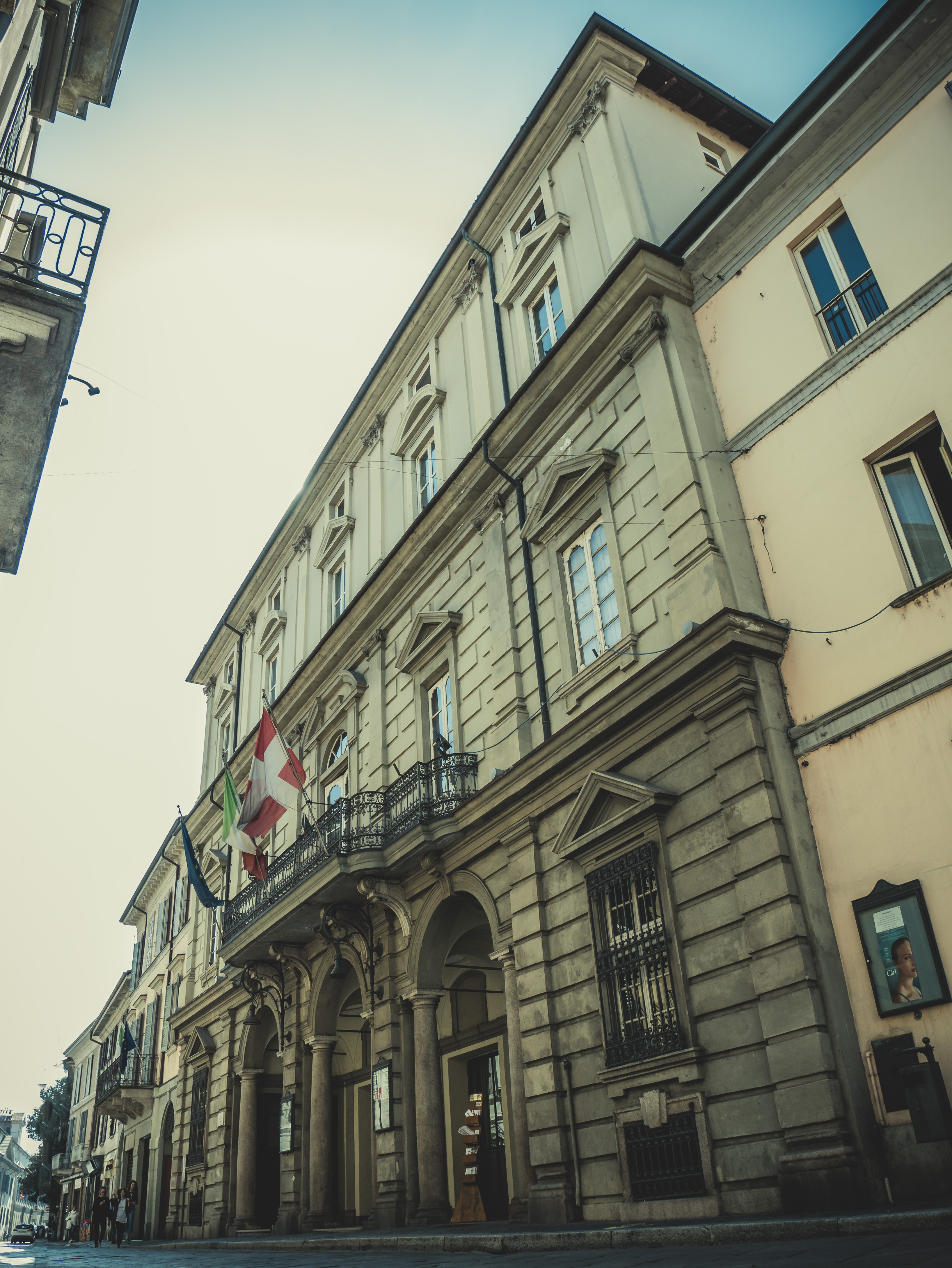 Teatro Fraschini This is a photo of a monument which is part of cultural heritage of Italy.